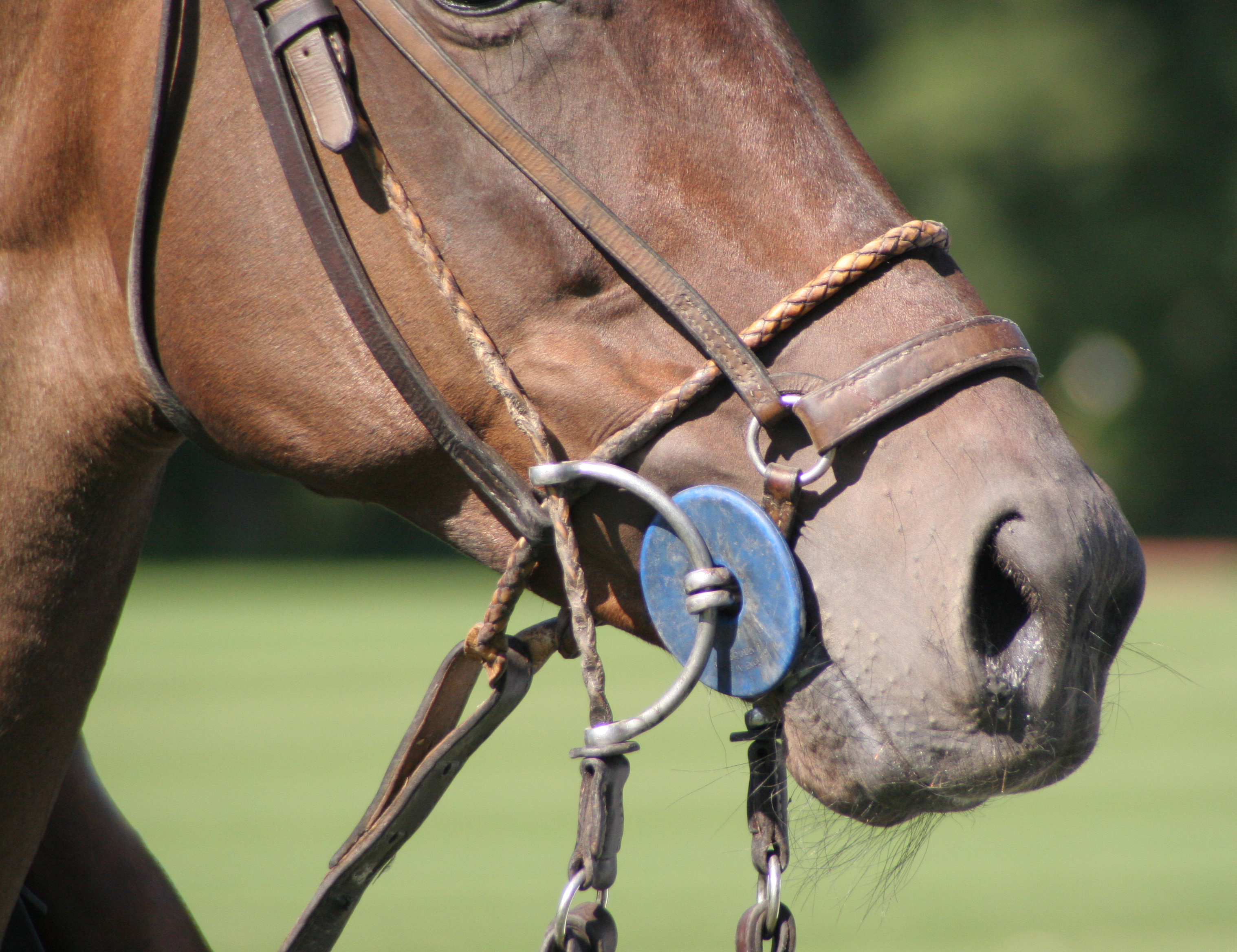 Aufziehtrense